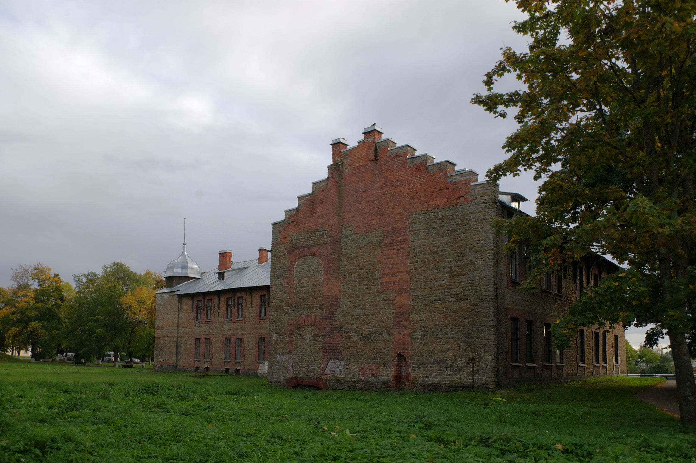 Здание Коммерческого училища в городе Кингисепп. Северный (тыловой) фасад.